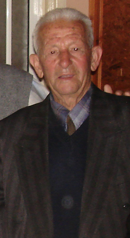 Eski Taşpınar (Kıbrıs) muhtarı merhum Arif Salih Aktoprak.